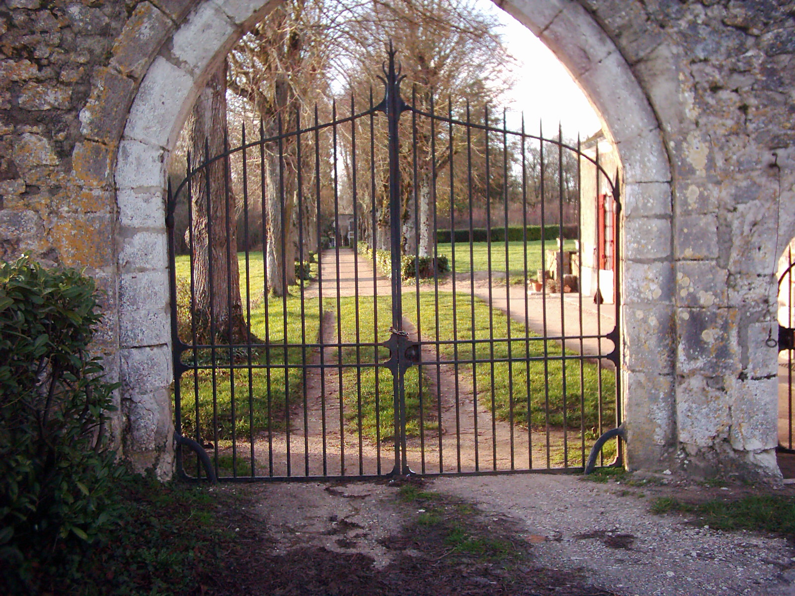 Portail devant l'allée menant à l'emplacement de l'ancienne abbaye de la Guiche, dont il ne reste qu'une grange .